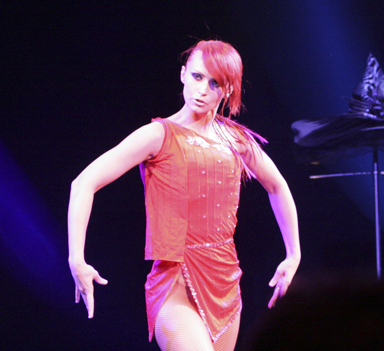 Die Verwandlungskünstler Sos und Victoria Petroysn